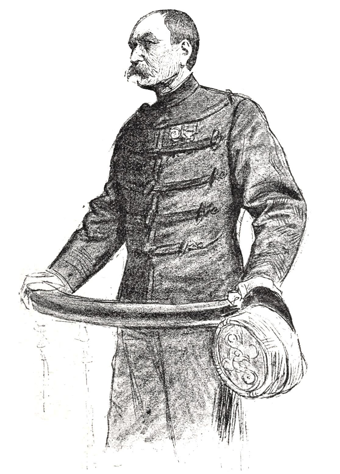 "M. le Général de Pellieux." (Septième audience du procès Zola)